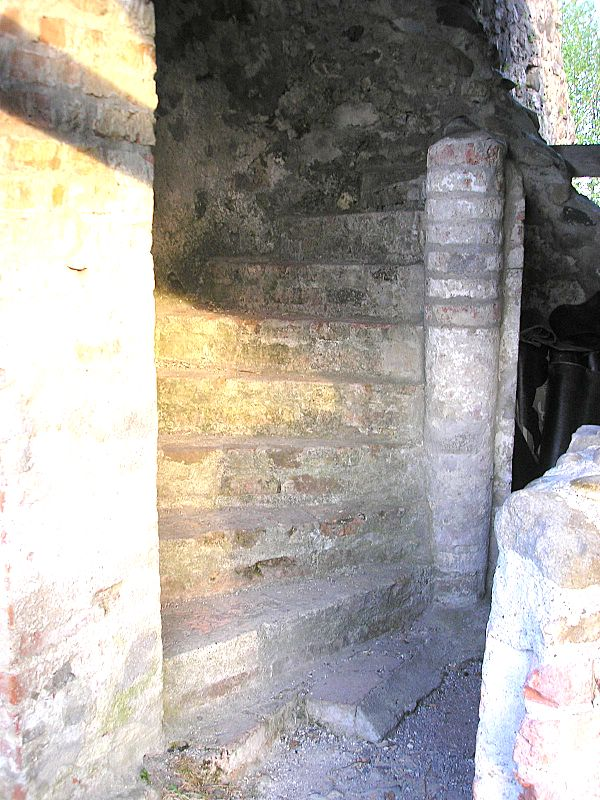 Burg Wolkenberg bei Wildpoldsried (Landkreis Oberallgäu, Bayerisch-Schwaben). Wendeltreppe am ehemaligen Palas. Eigene Aufnahme, Mai 2008 / Wolkenberg castle near Wildpoldsried (Landkreis Oberallgäu, Bavaria, Germany). Spiral stair at the central building. Own photo, May 2008